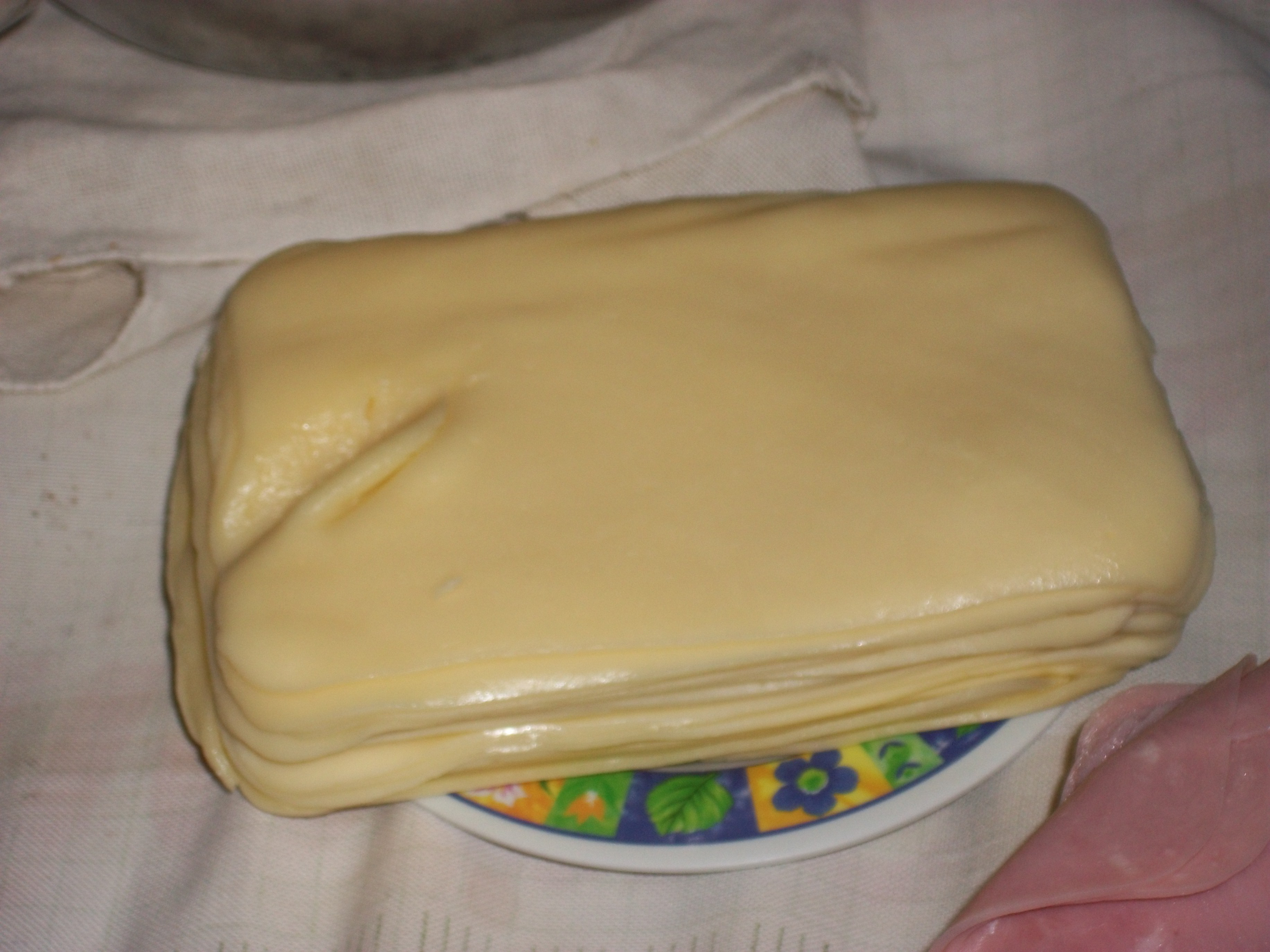 Mozarela fatiada brasileira.